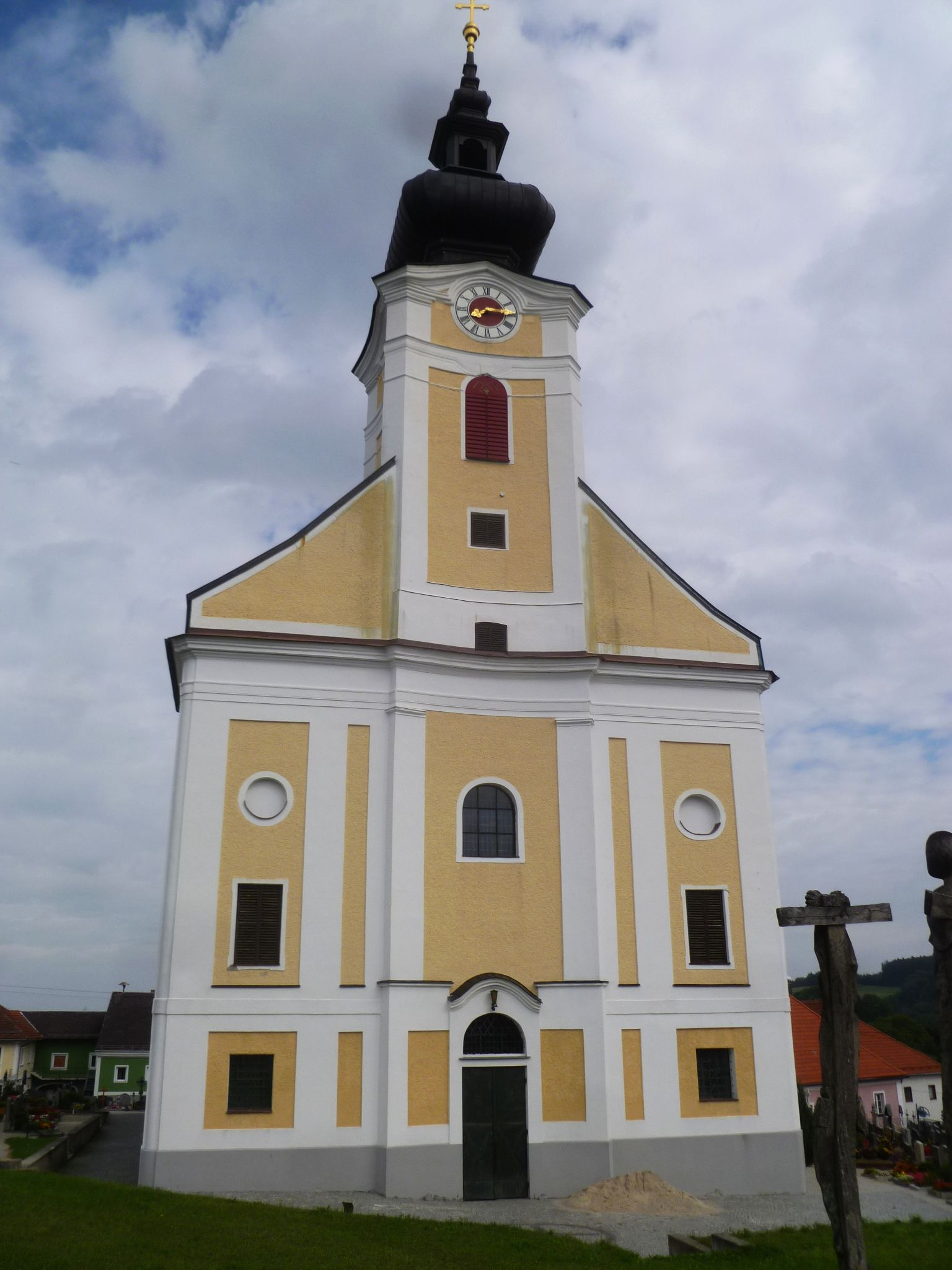 Kath. Pfarrkirche hl. Laurentius